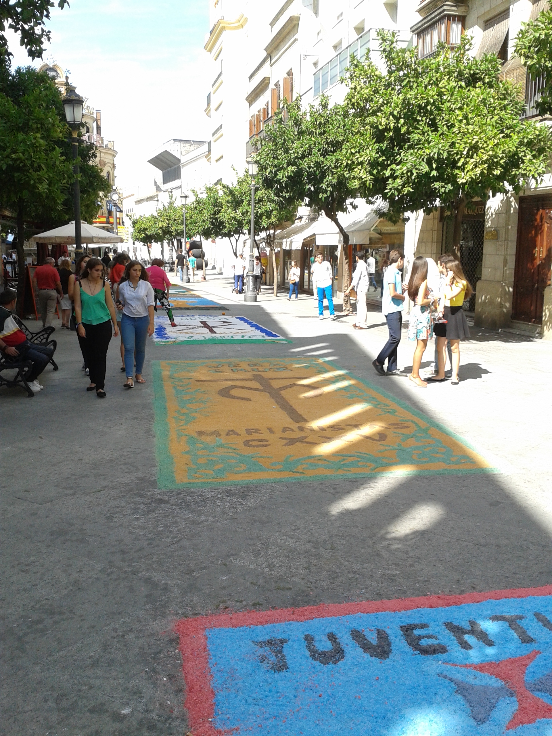 Corpus Christi Jerez 2014 Gallo Azul